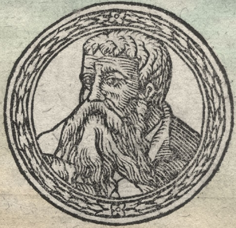 Vykintas, Duke of Samogitia